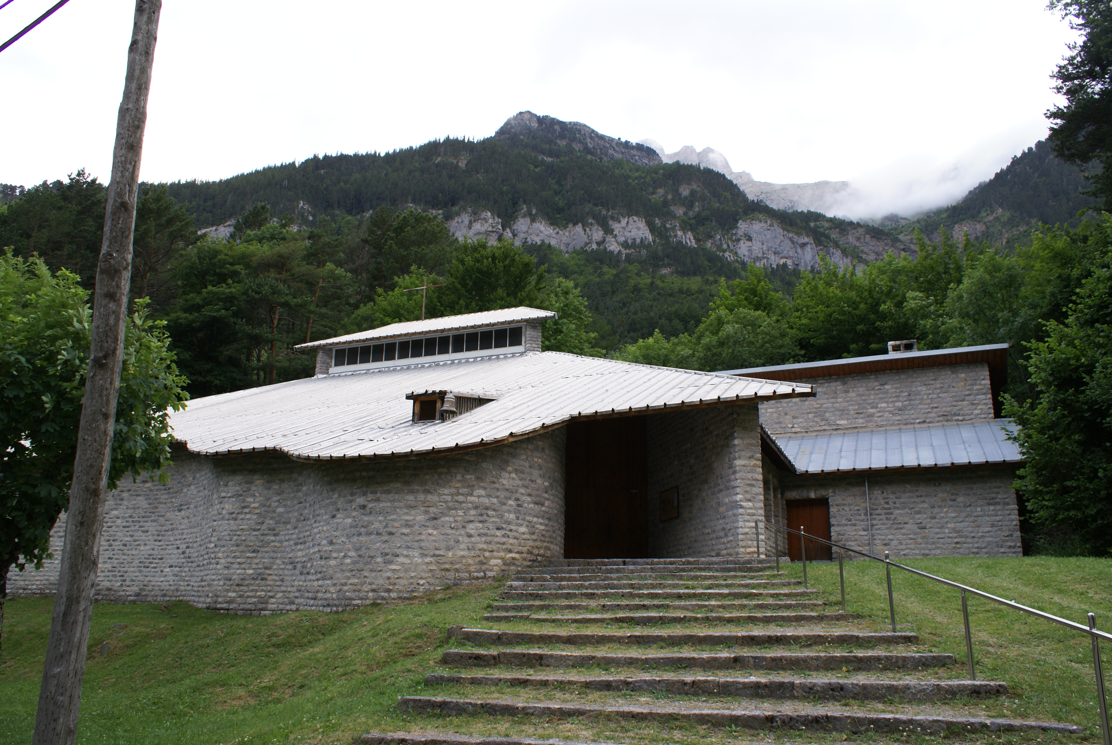 Iglesia parroquial de Nuestra Señora del Pilar en Canfranc-Estación